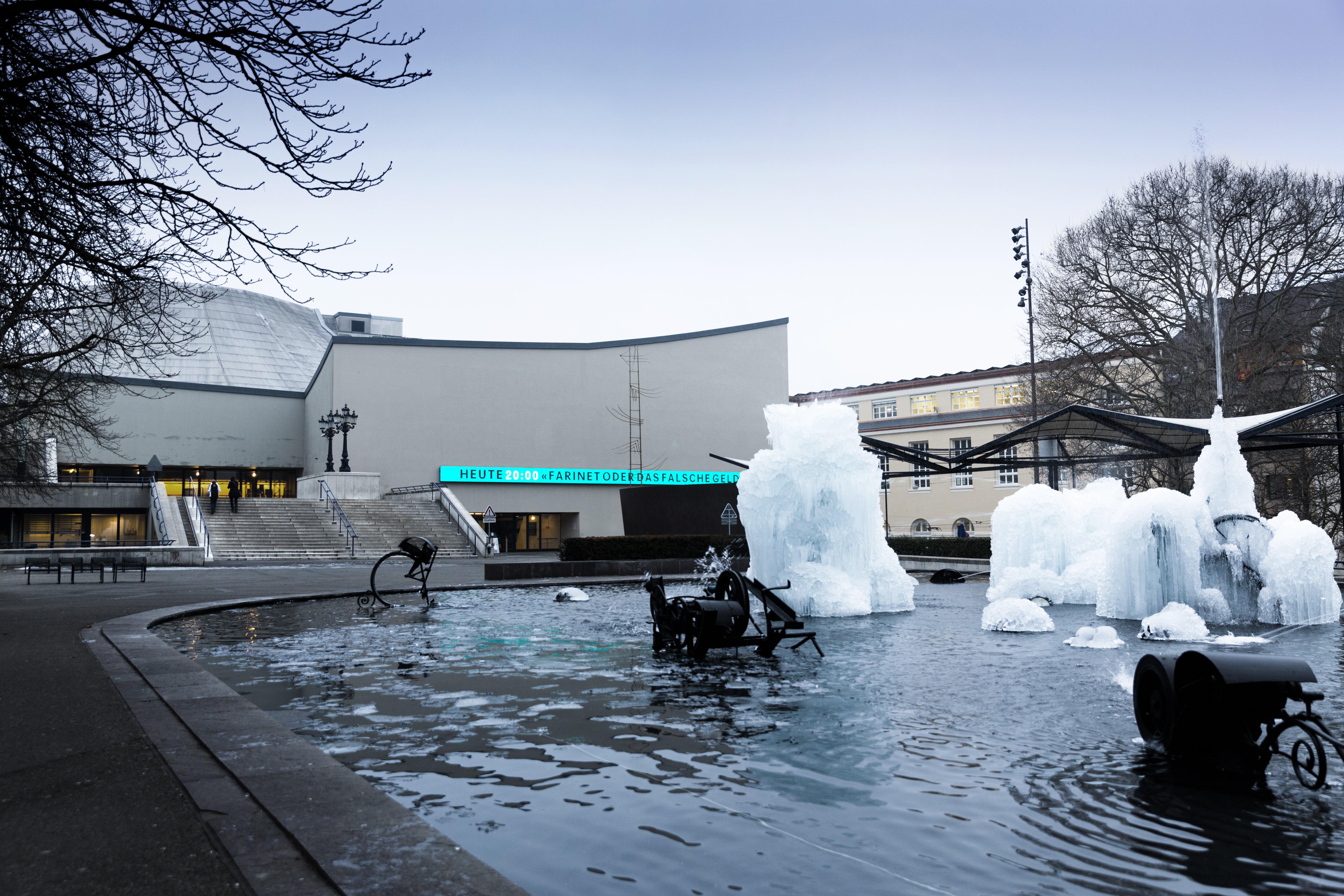 Theater Basel, im Vordergrund der Tinguely-Brunnen (auch: Fasnachts-Brunnen)